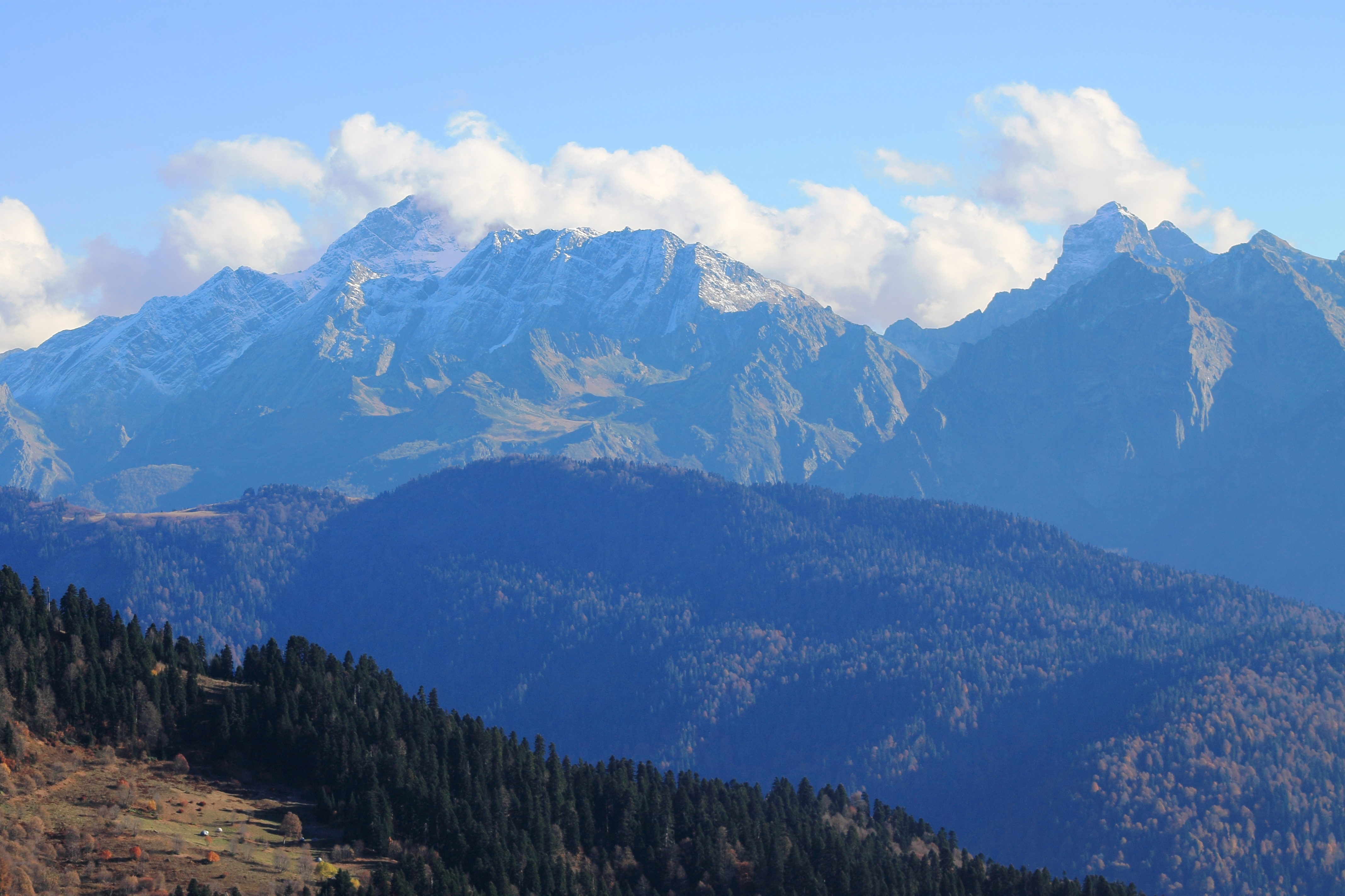 Сочинский национальный парк: Вид в сторону хребта Грушевого и на вершины Агепста и пик Сочи. Сочинский национальный парк расположен на южном склоне Большого Кавказа в Краснодарском крае. This image is related to the protected area of Russia number 2300430